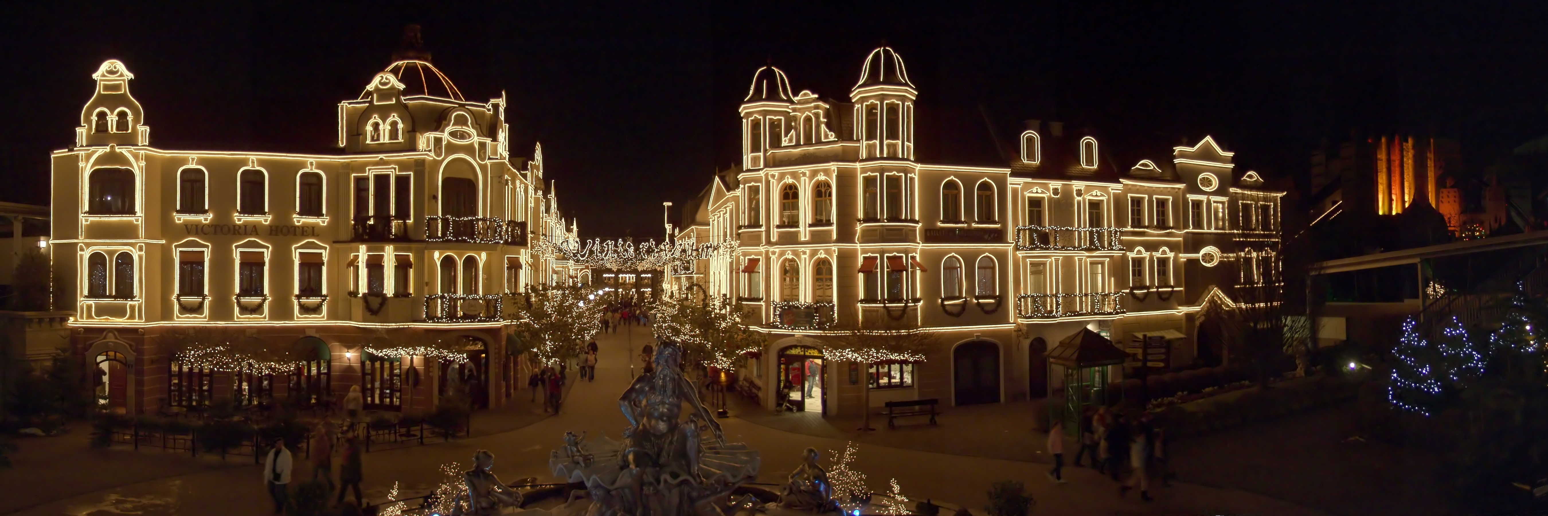 Phantasialand bei Brühl. Alt-Berlin am Abend - „Wintertraum“